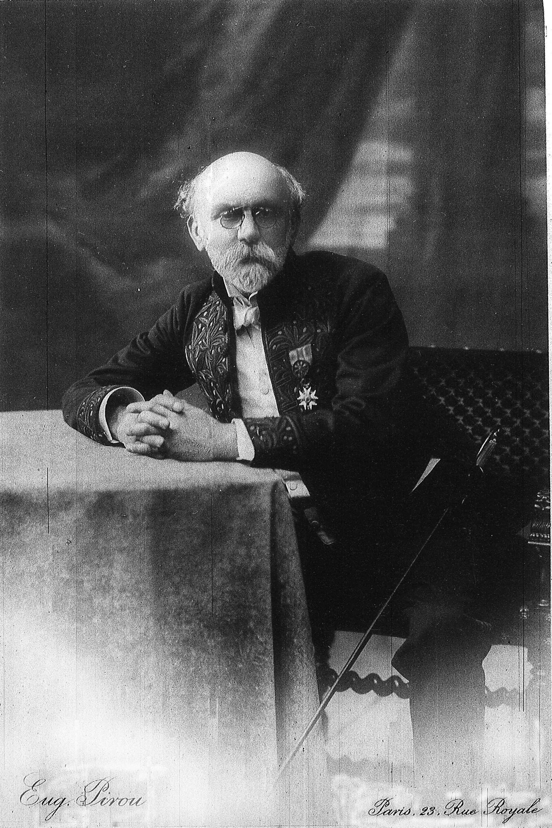 René de Saint-Marceaux issu de la bibliothèque de reims.